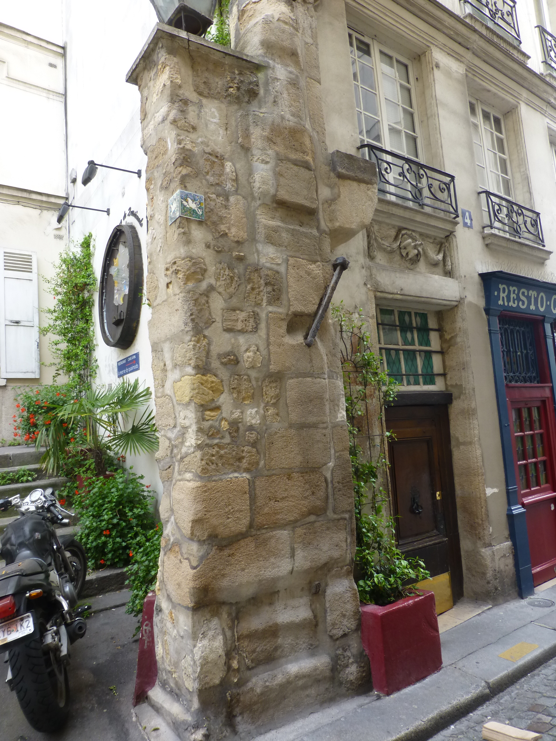 Paris, Vestiges de rempart, rue de la colombe.